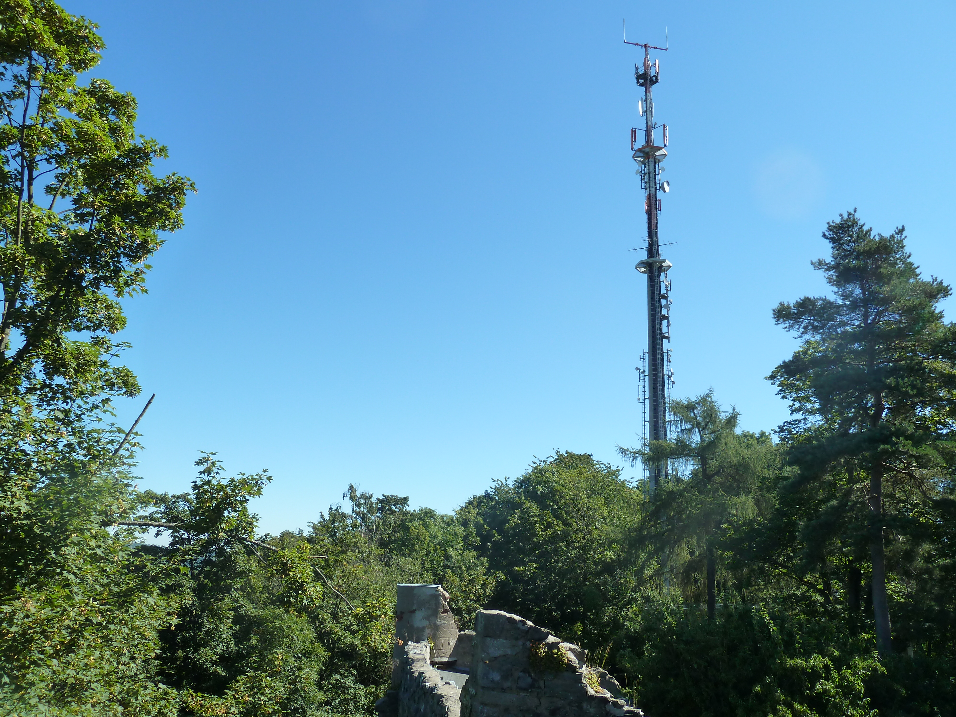 Sendeanlage Hof-Labyrinthberg